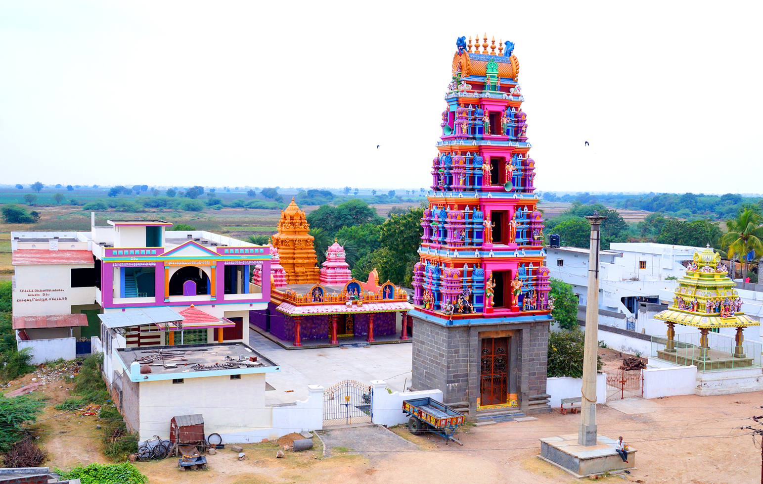 పొనుగుపాడు గ్రామంలో వేంచేసియున్న శ్రీగంగా అన్నపూర్ణ సమేత శ్రీకాశీవిశ్వేశ్వరస్వామి దేవస్థానం.